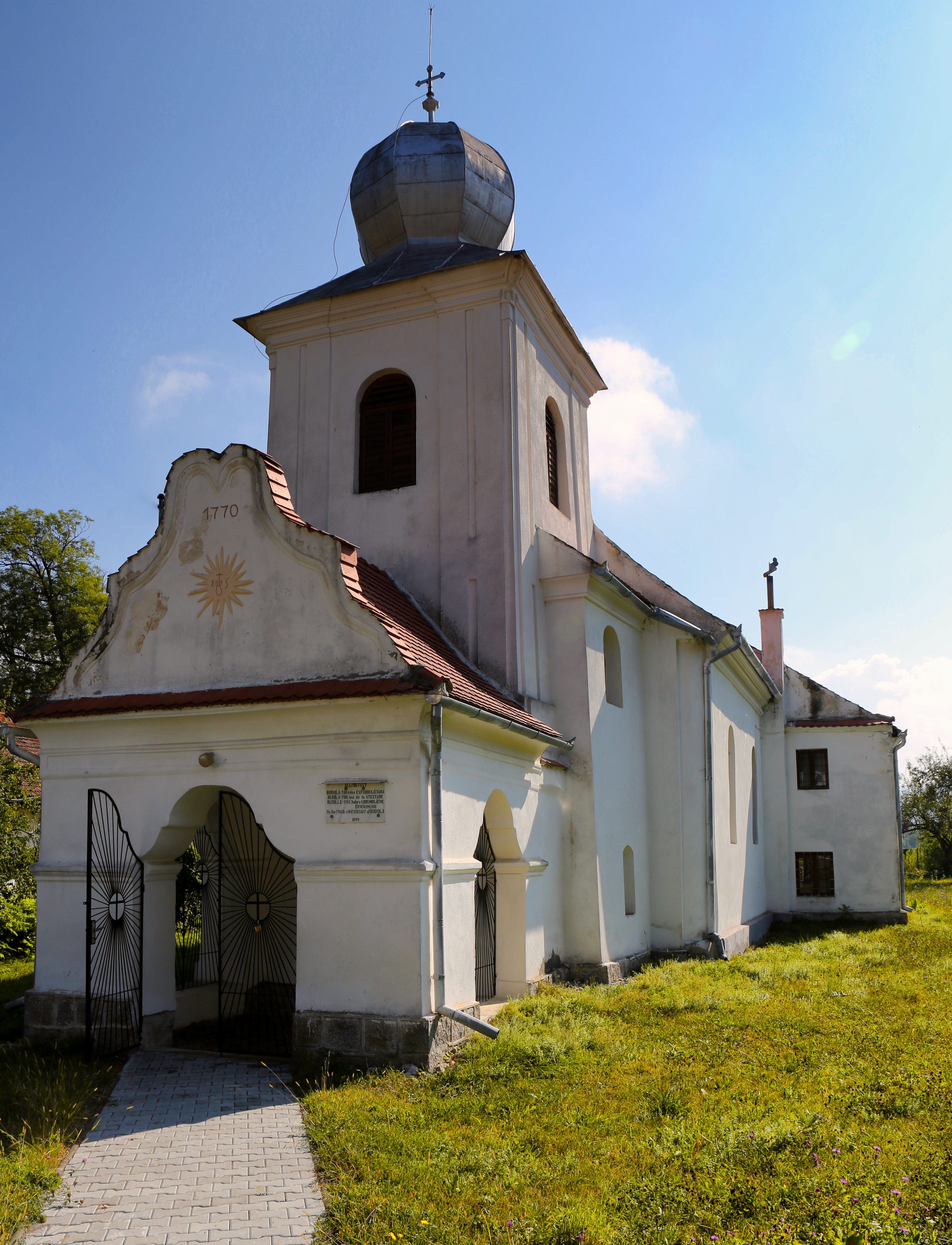 Capelă 02